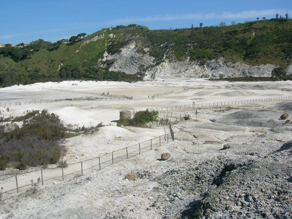 Veduta della solfatara di Pozzuoli dal belvedere